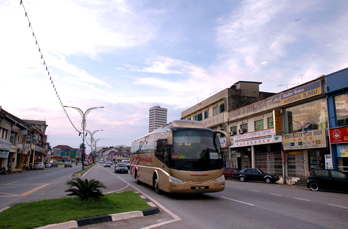 Segamat